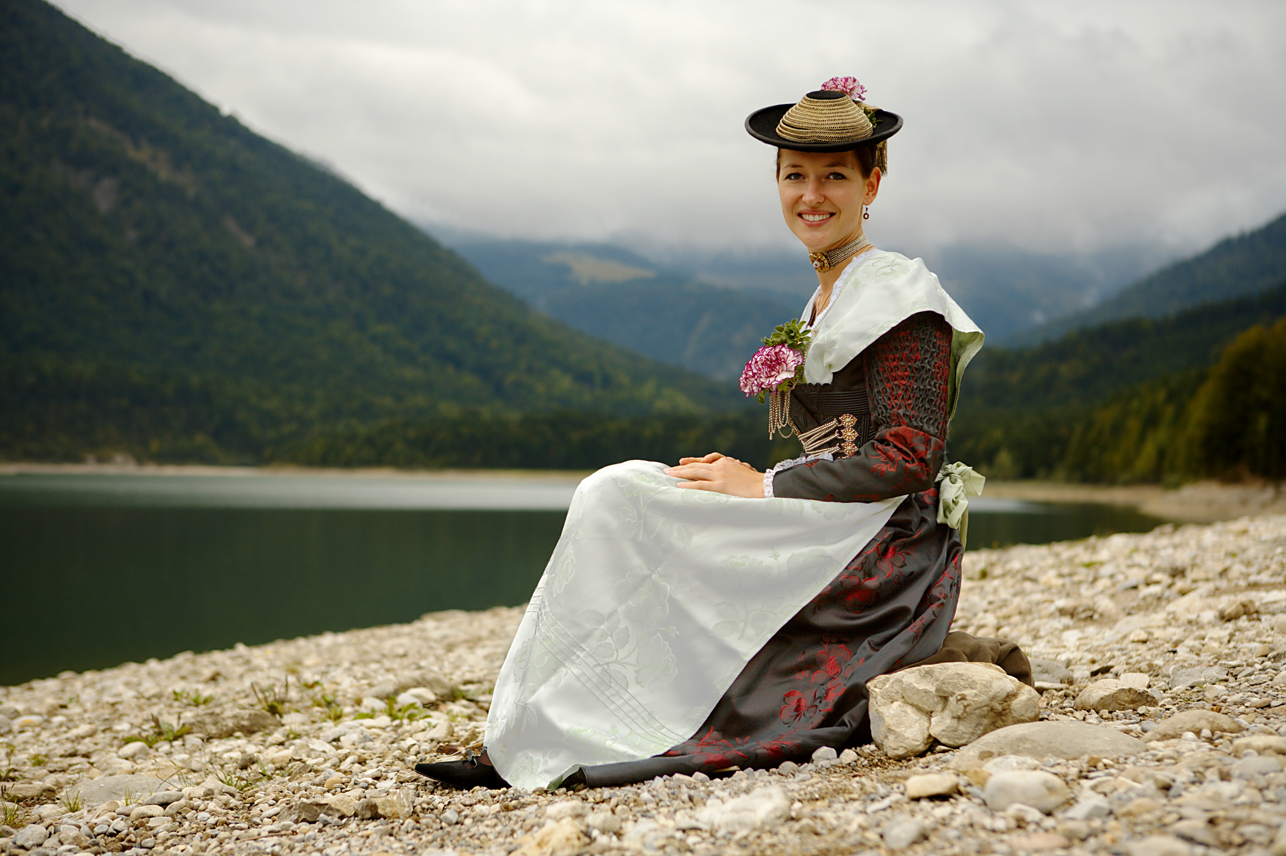 Isarwinkler Tracht aus dem Umland von Bad Tölz (Oberbayern)